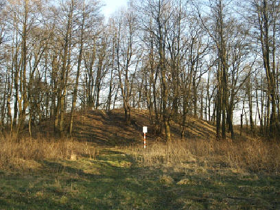 Grodzisko "Okop" w Skrwilnie